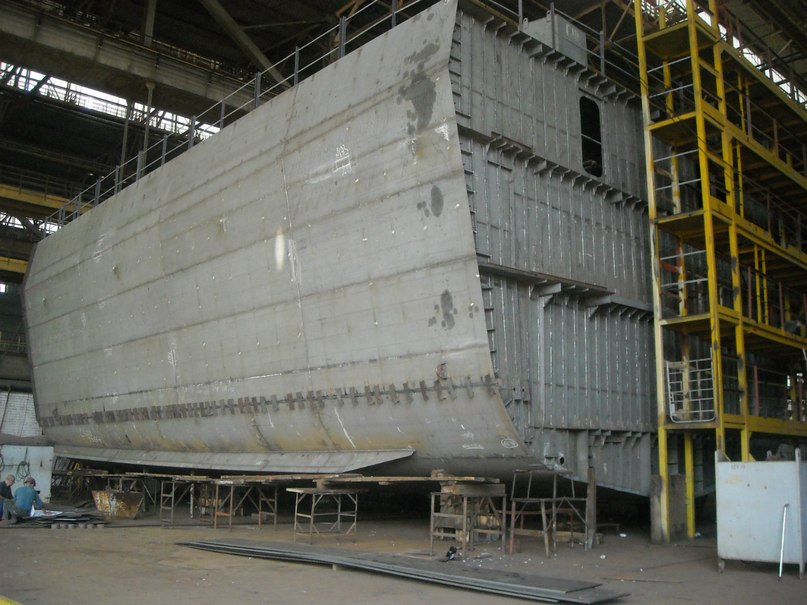 Готова перша секція корвету проекта 58250.